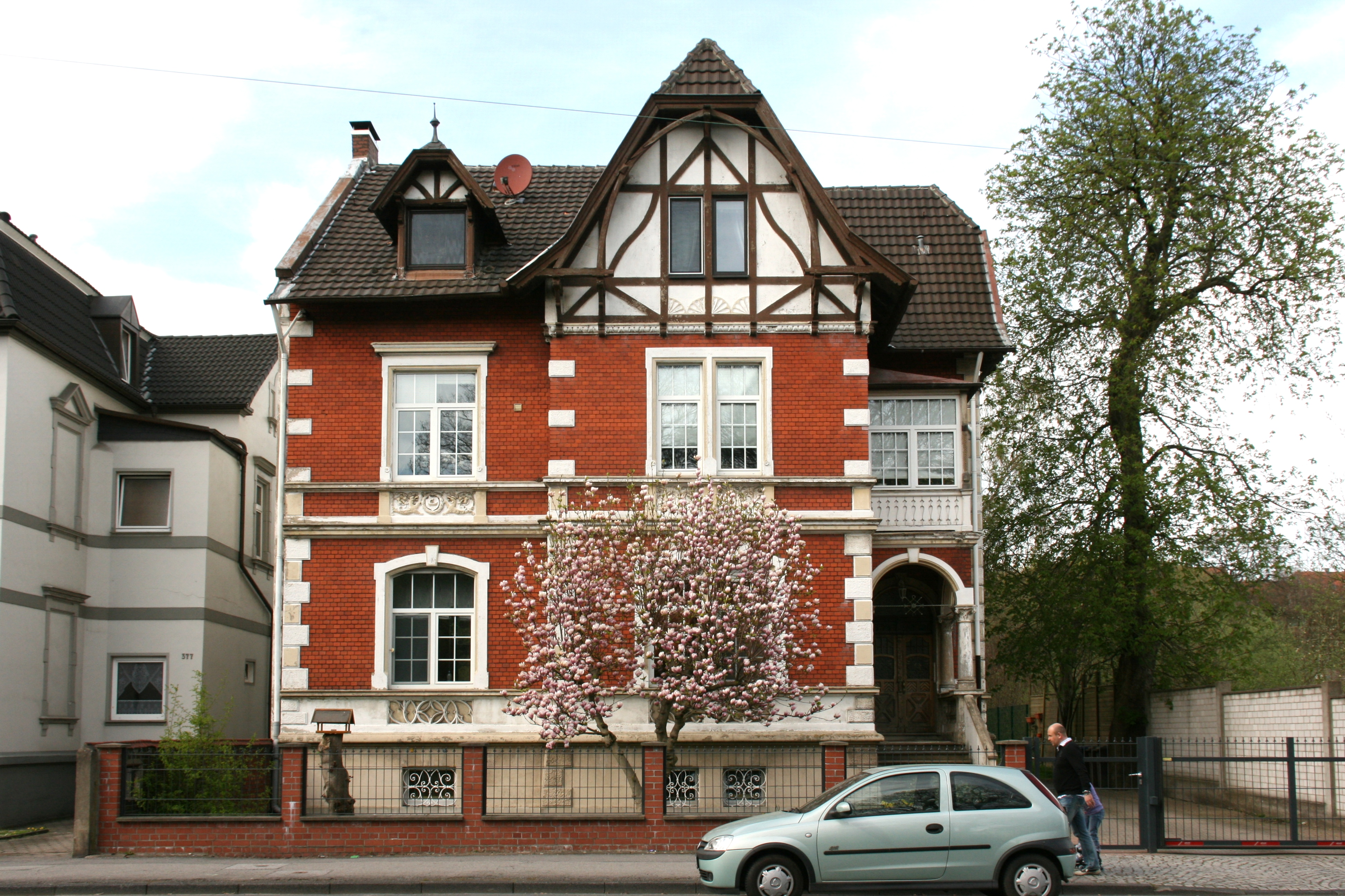 Hagener Straße 379 in Gevelsberg